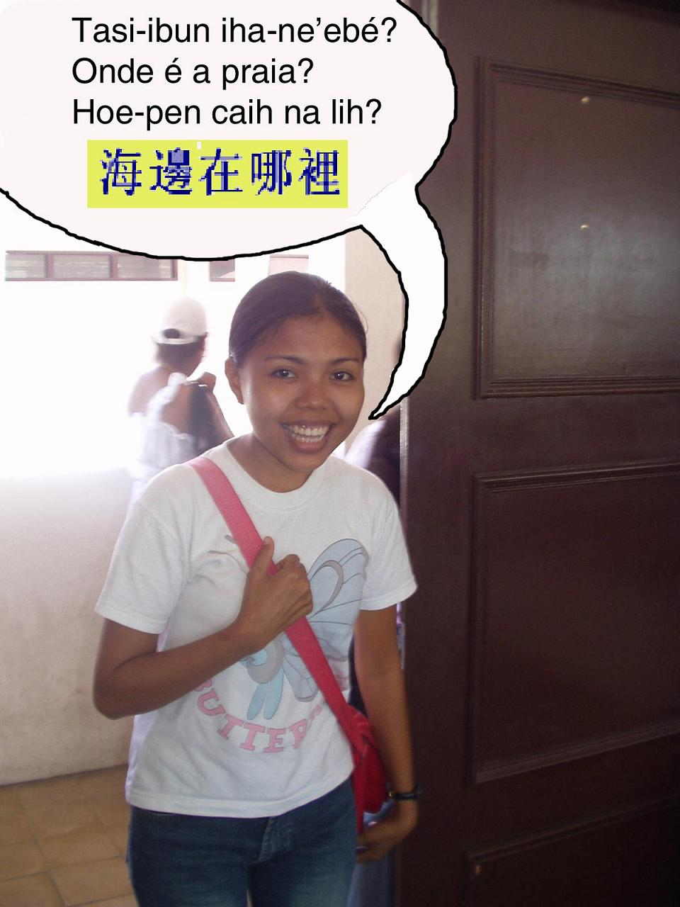 Photo & editing both by João Paulo T. Esperança. This photo was used as illustration in a Portuguese language course in tetum, whose lessons used to be published weekly in the East Timorese newspaper Lia Foun. Fotografia e composição da autoria de João Paulo T. Esperança. Esta fotografia foi usada como ilustração num curso de língua portuguesa em tétum cujas lições eram publicadas no jornal timorense Lia Foun. Person portraited / Pessoa retratada: Fernanda Correia, an East Timorese Hakka girl (uma moça sino-timorense hakka), speaking (up to down) Tetum, Portuguese, ?, Chinese.